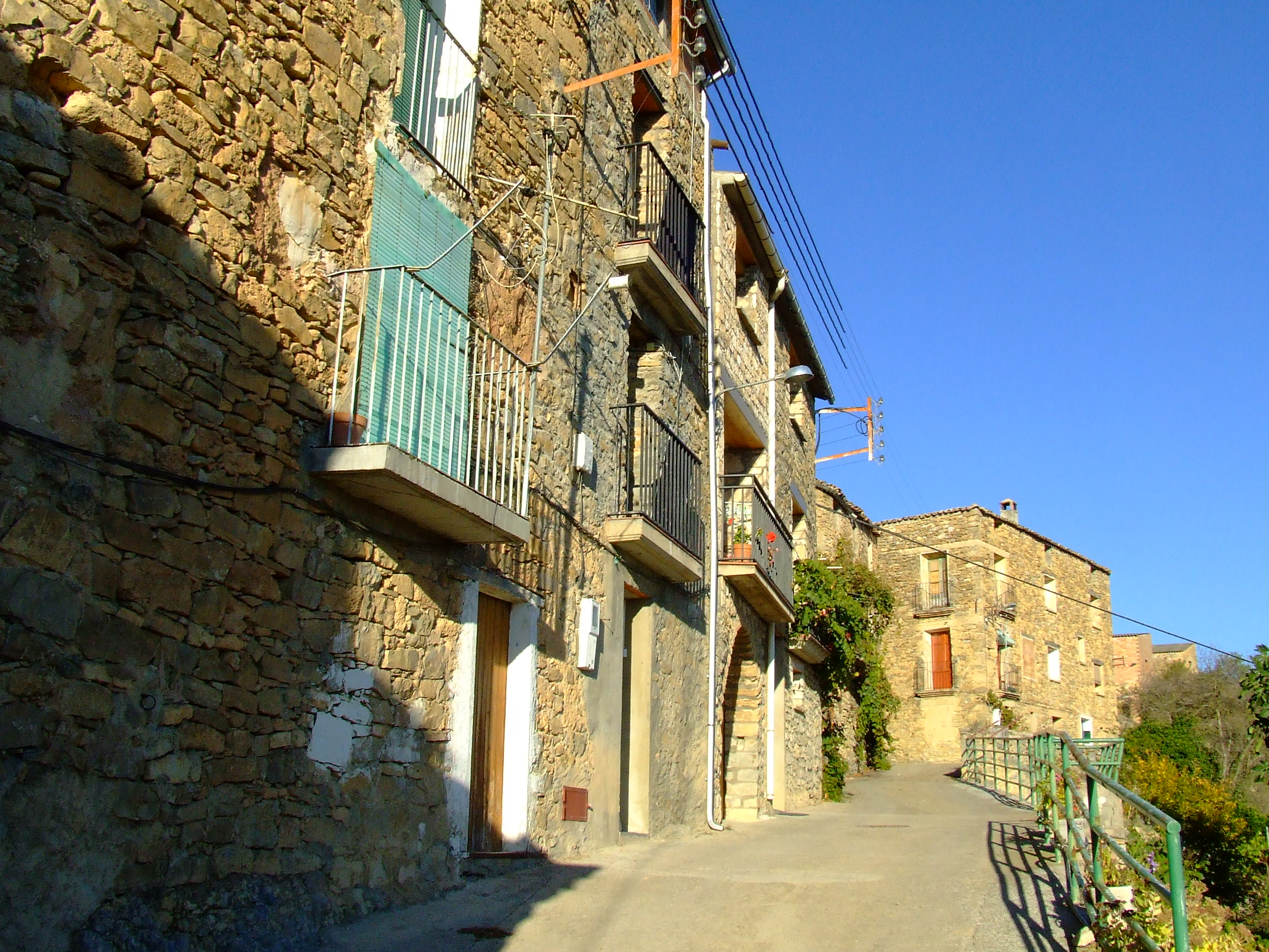 Un carrer del poble de Basturs (Orcau, Isona i Conca Dellà, Pallars Jussà)